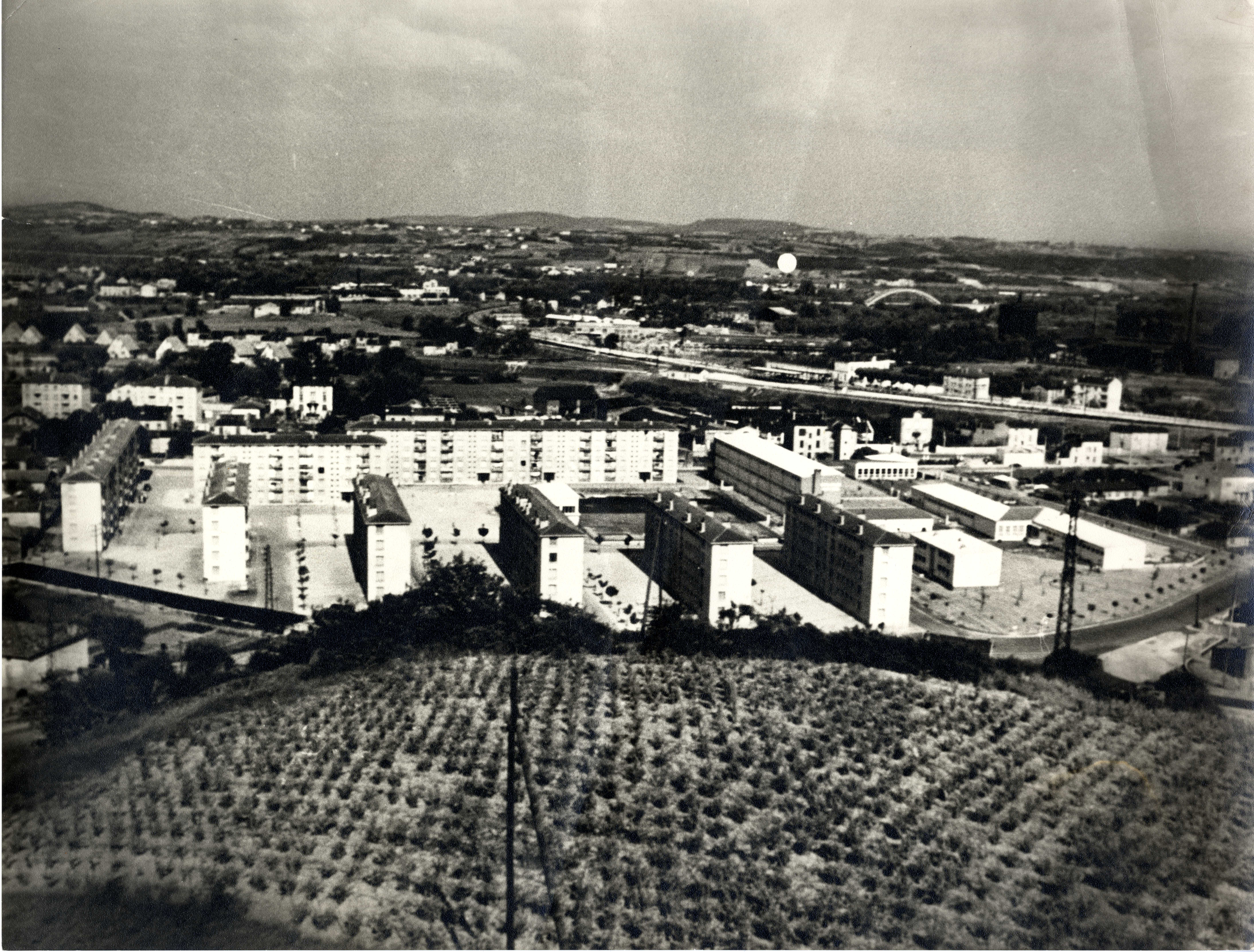 Vue du quartier des Plaines, Cote provisoire 085, Archives municipales de Givors.